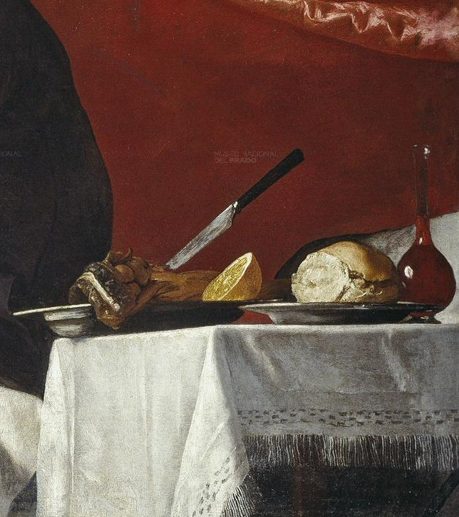 Isaac bendice a jacob. Detalle del bodegón